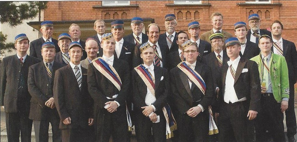 Angehörige des rekonstituierten Corps Vandalia Rostock